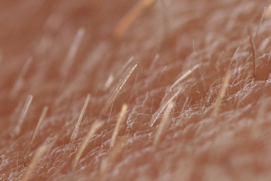 Skin